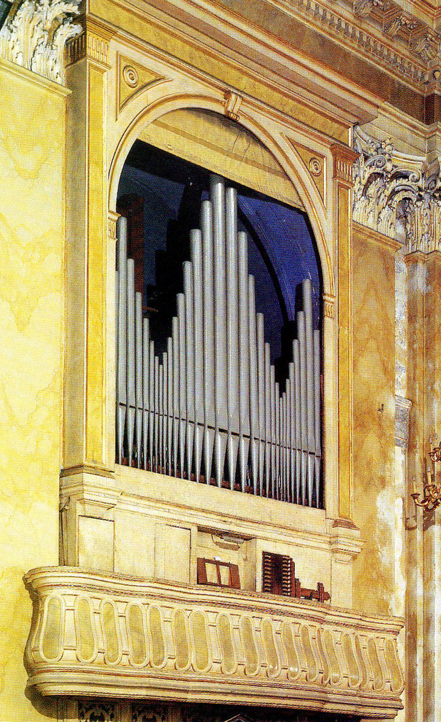 San_lorenzo_brescia_organo.jpg